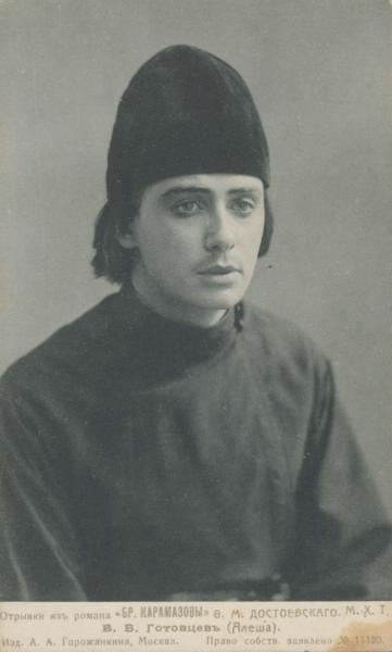 Актер Владимир Готовцев в роли Алеши в спектакле «Братья Карамазовы» по роману Федора Достоевского